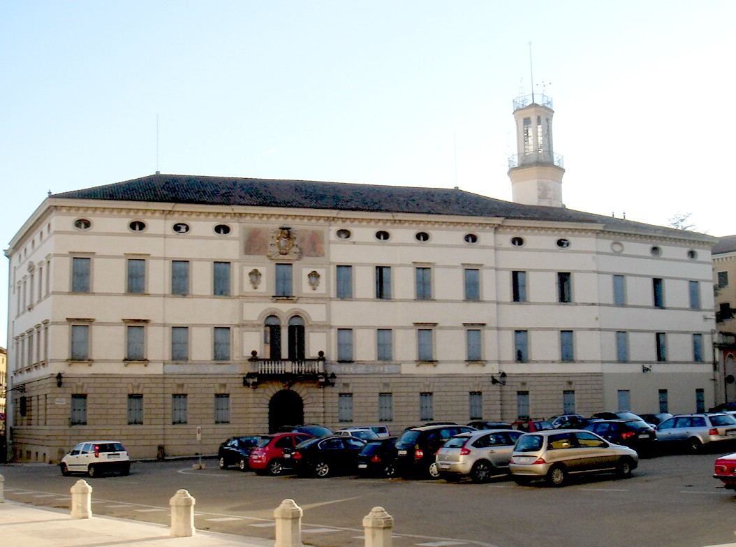 Ceneda: museo diocesano Albino LucianiSony Cyber-shot DSC-T7